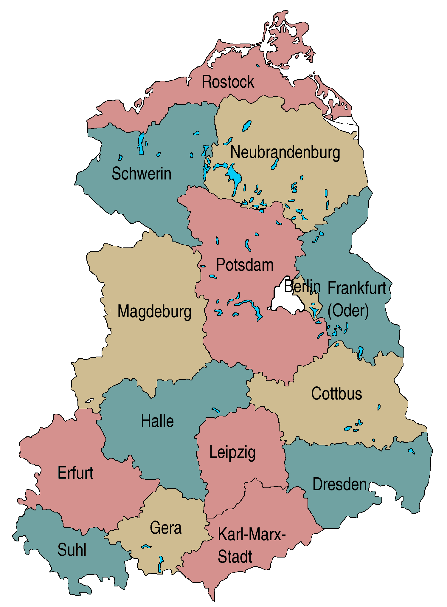 modified to show districts in different colors, larger captions, based on Bild:DDR Verwaltung.png, Karte „Verwaltungsgliederung der DDR“, Kartografie: Acf 1972 (Tuschezeichnung auf Folie); digitale Nachbearbeitung: Acf 2004; Public Domain